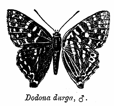 Male Dodona durga (Kollar, [1844]), upperside (left) and underside (right)